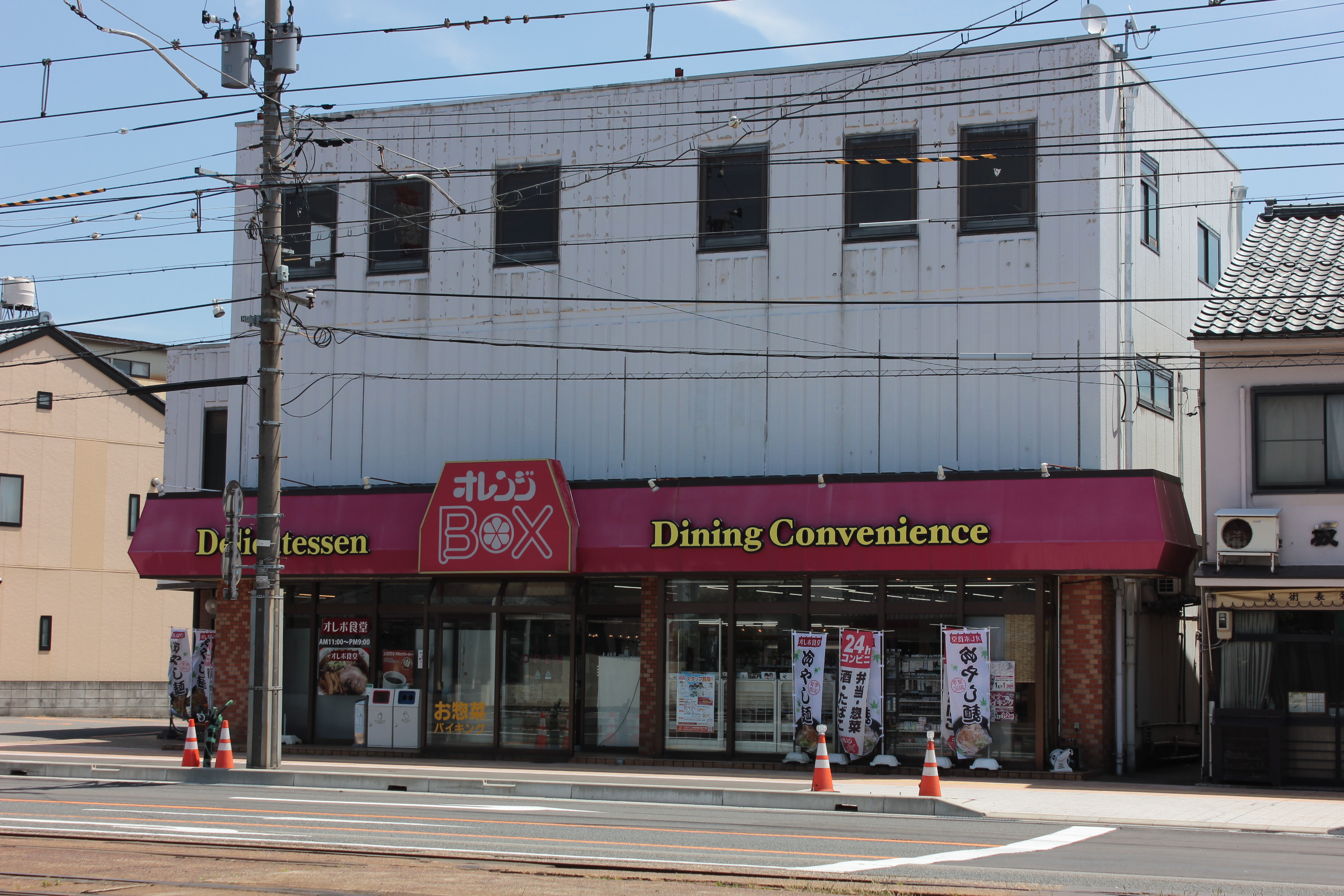 オレンジBOXおおつや（福井県福井市）、ここを運営する大津屋の本社所在地でもある。 Canon EOS Kiss X5